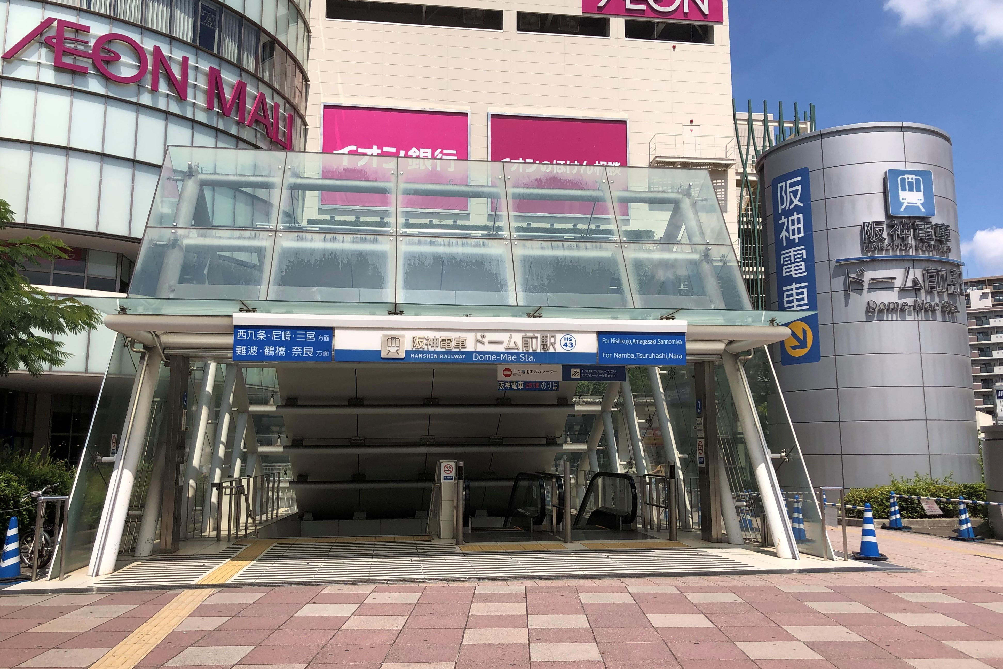 阪神電鉄ドーム前駅